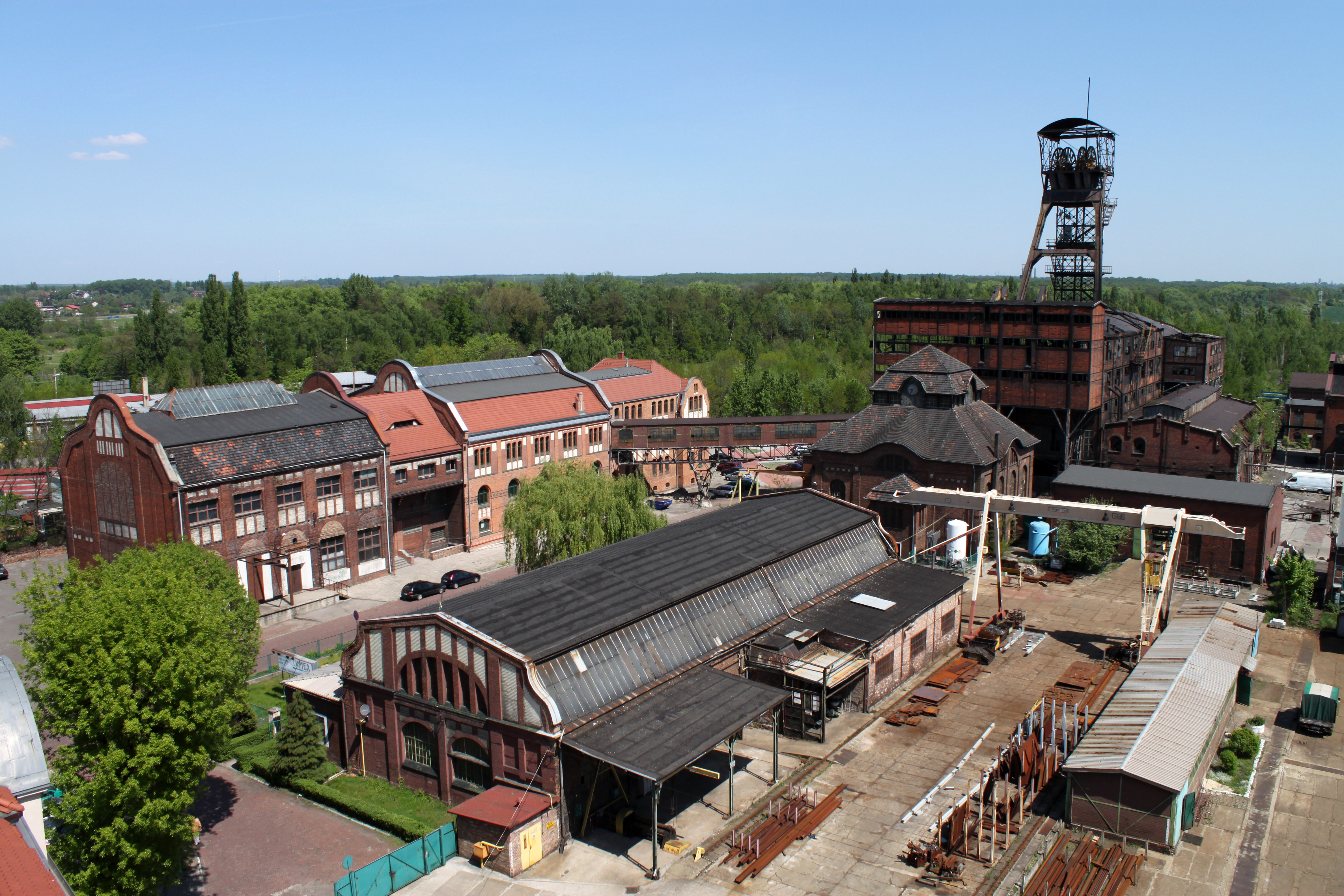 Kopalnia "Szczęście Ludwika", wybudowana przez właściciela koncernu "Borsig", Alberta Borsiga w latach 1867- 1873.